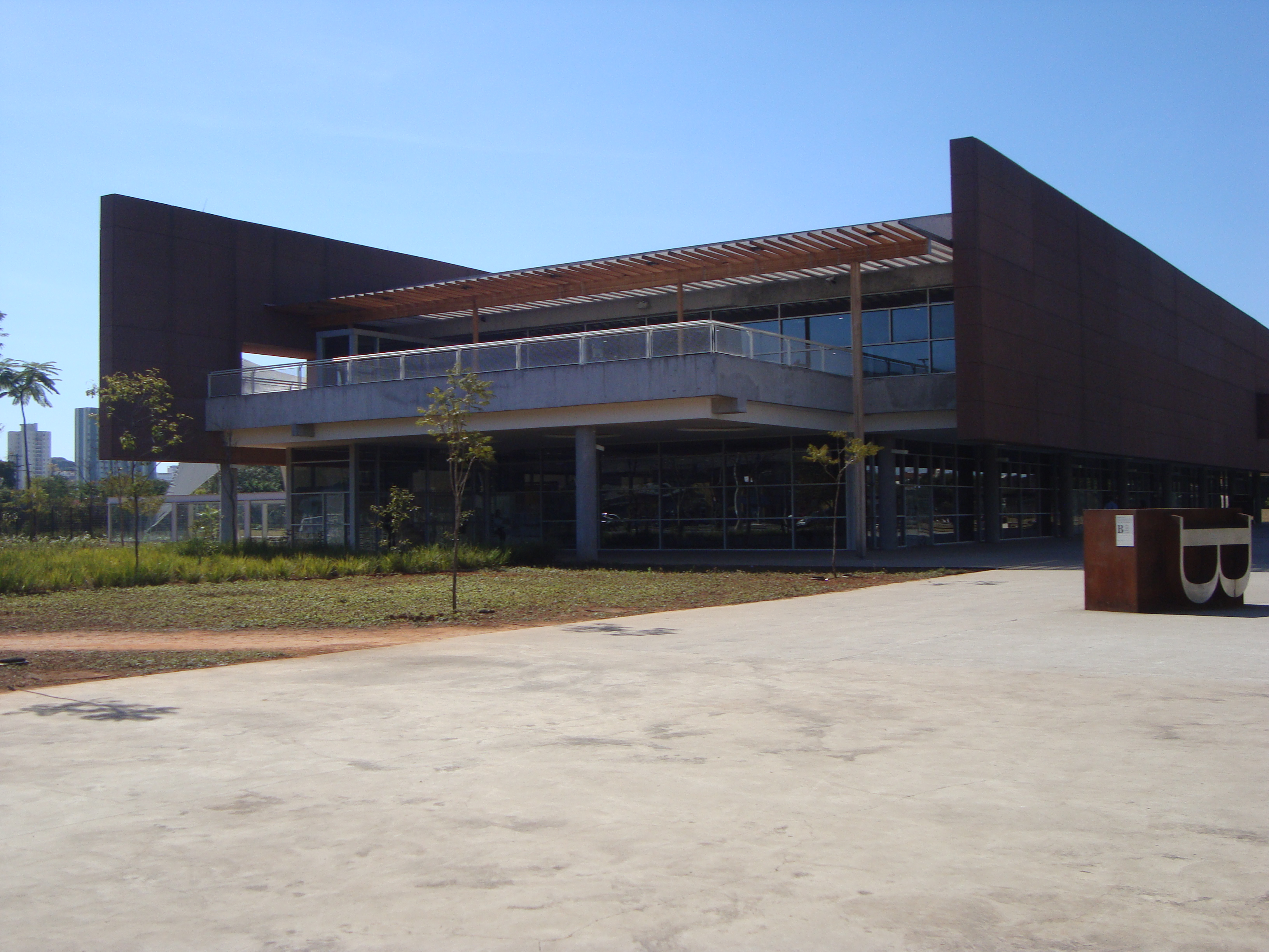 Biblioteca de São Paulo localizada no Parque da Juventude distrito Santana na cidade de São Paulo, Brasil.